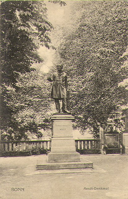 Das Ernst Moritz Arndt-Standbild auf dem Alten Zoll in Bonn von Bernhard Afinger, 1864